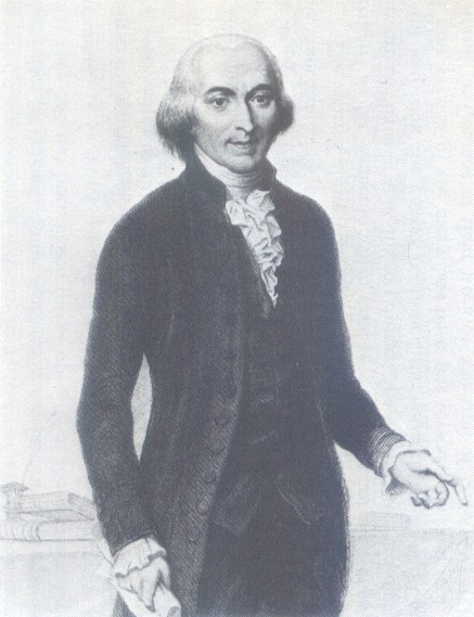 Der französische Politiker Jean-Marie Roland (1734–1793)